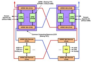 شکل ۴ معماری یکپارچه شده و ماژولار دیجیتال